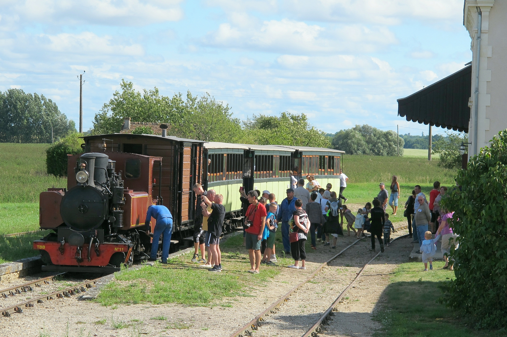 Un train du TBB en gare d'Argy (Indre) le 23 août 2015.